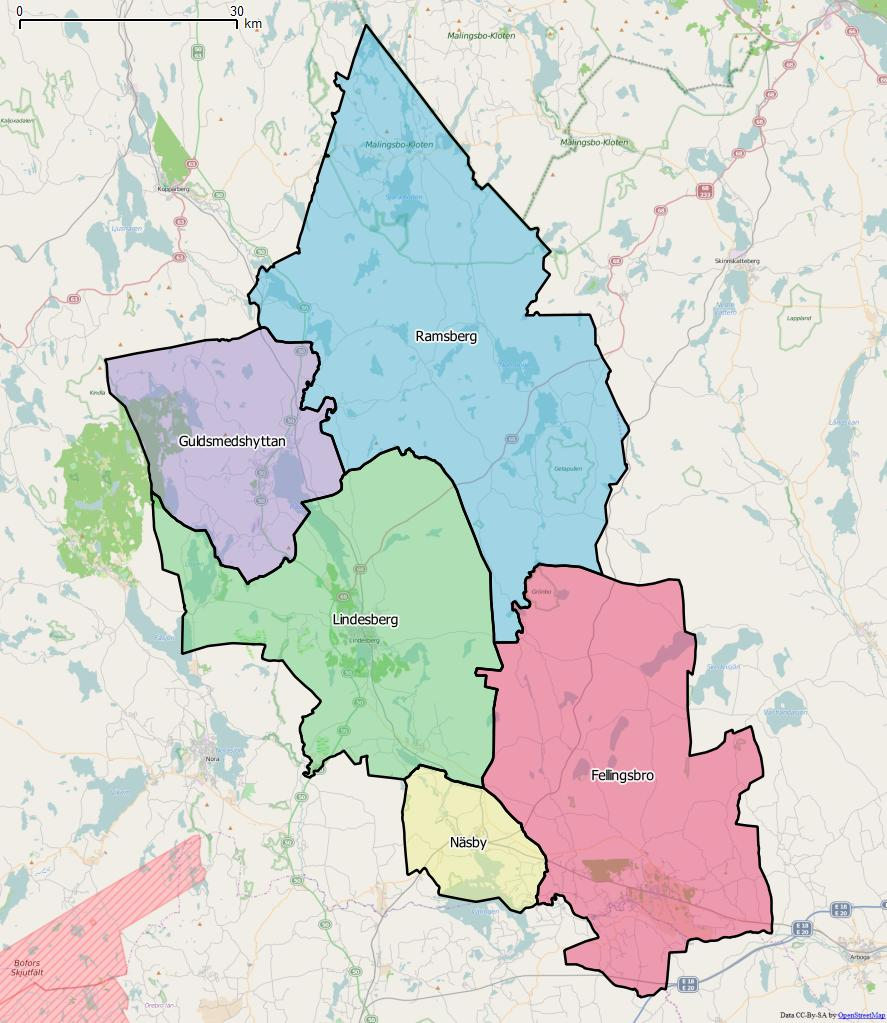 Distriktsindelningen i Lindesbergs kommun World file: 137.76613924304115244 0 0 -137.76613924304115244 1644856.81320554995909333 8397756.17233263701200485